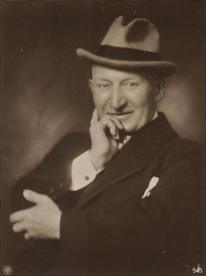 Der deutsche Schauspieler Herbert Paulmüller